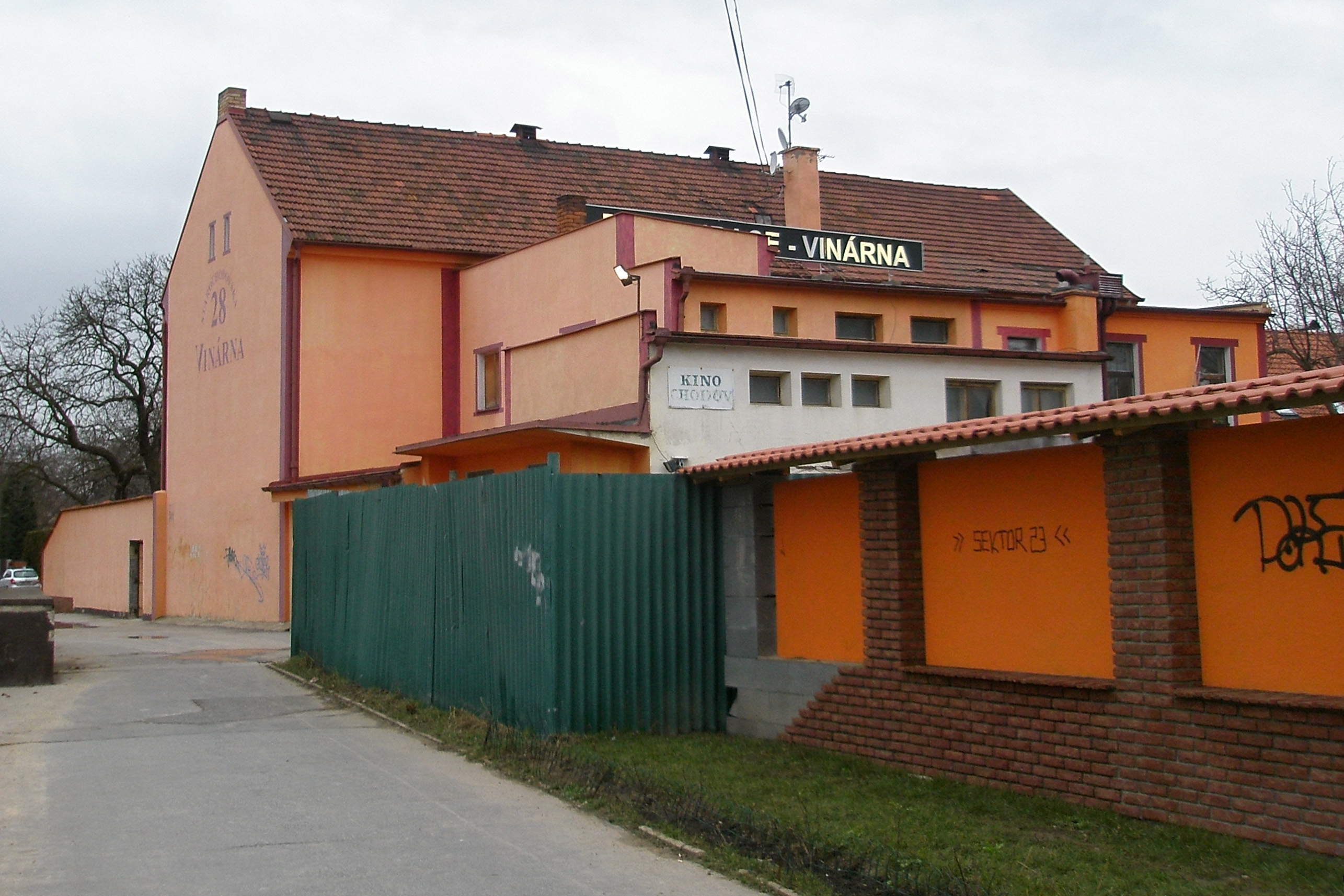 Starochodovská č. p. 28, nyní vinárna - na zdi patrná cedule Kino Chodov